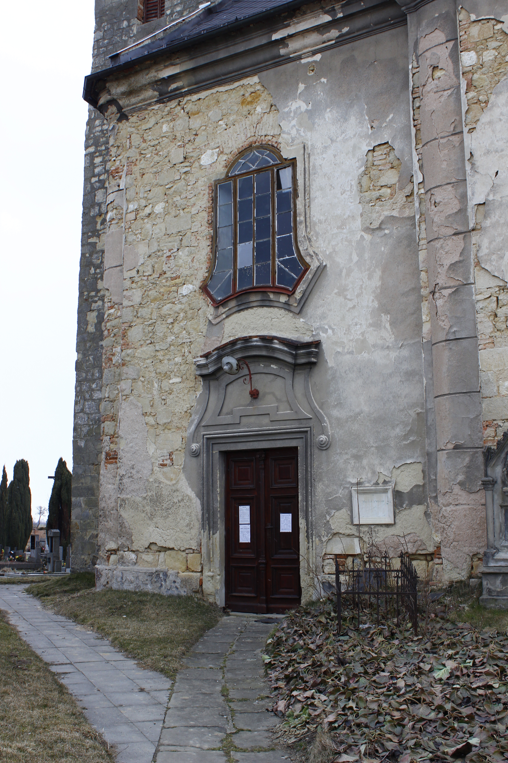 Vstup do kostela svatého Františka Serafinského v Kováni.